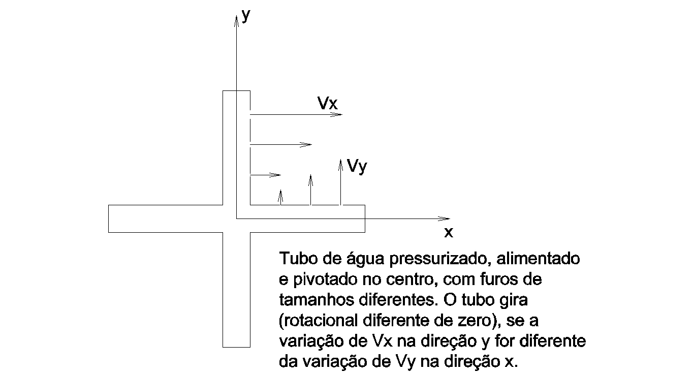 tubo de água do tipo usado em jardim. Exemplo da noção de rotacional